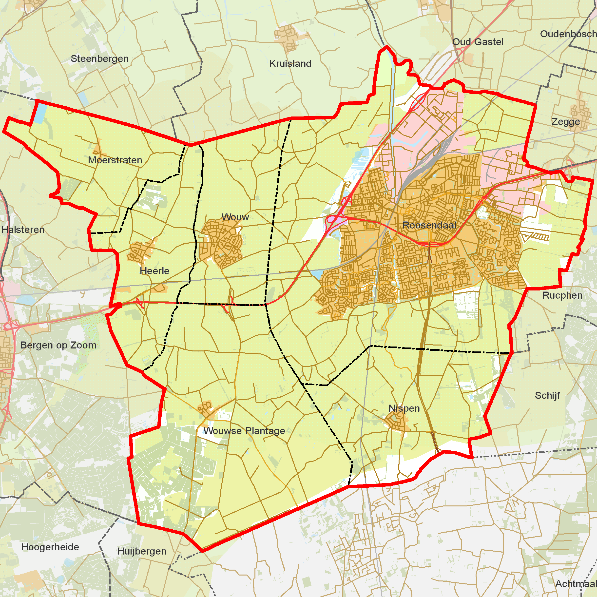 BAG woonplaatsen - Gemeente Roosendaal.png